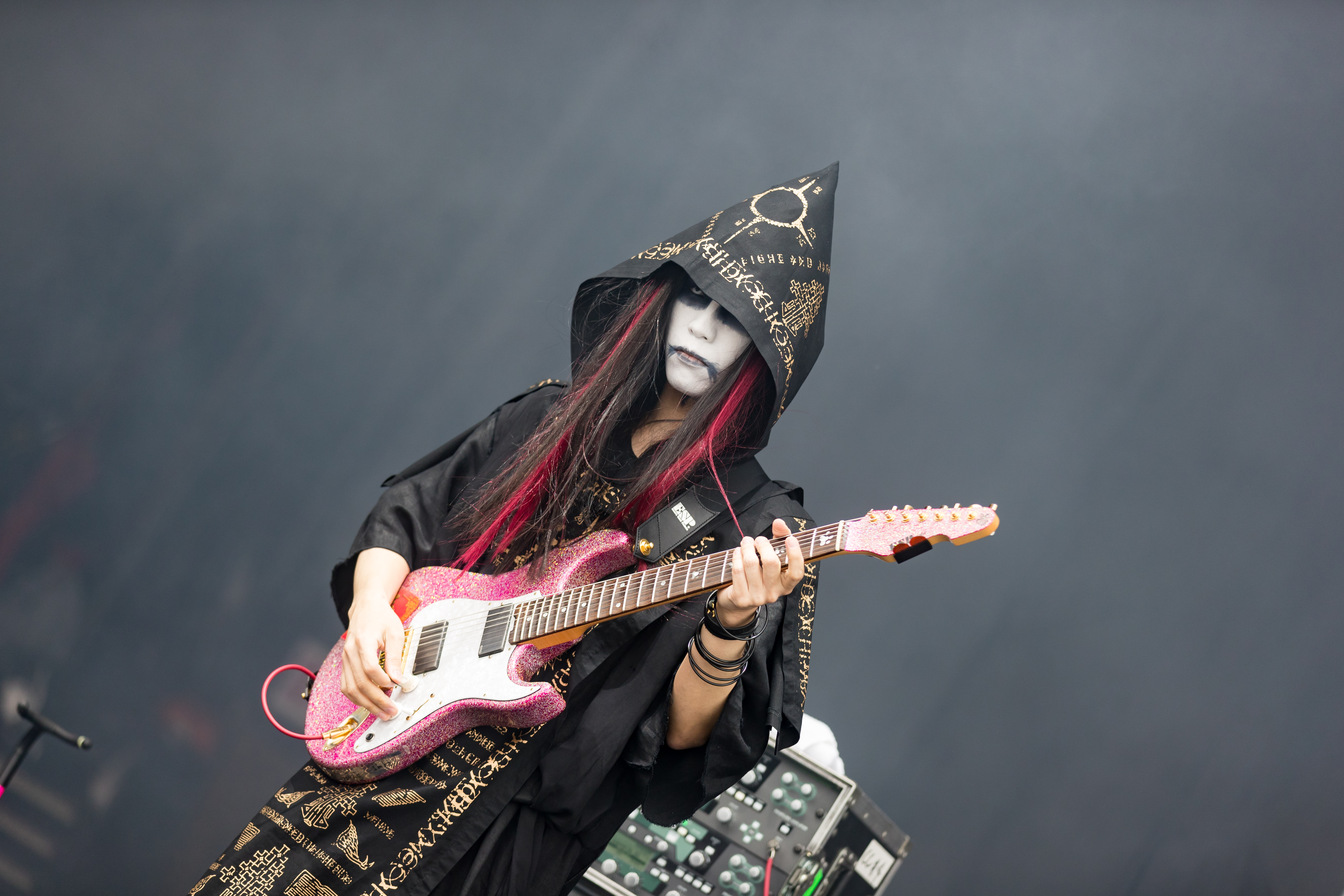 Babymetal @ Rock am Ring 2018